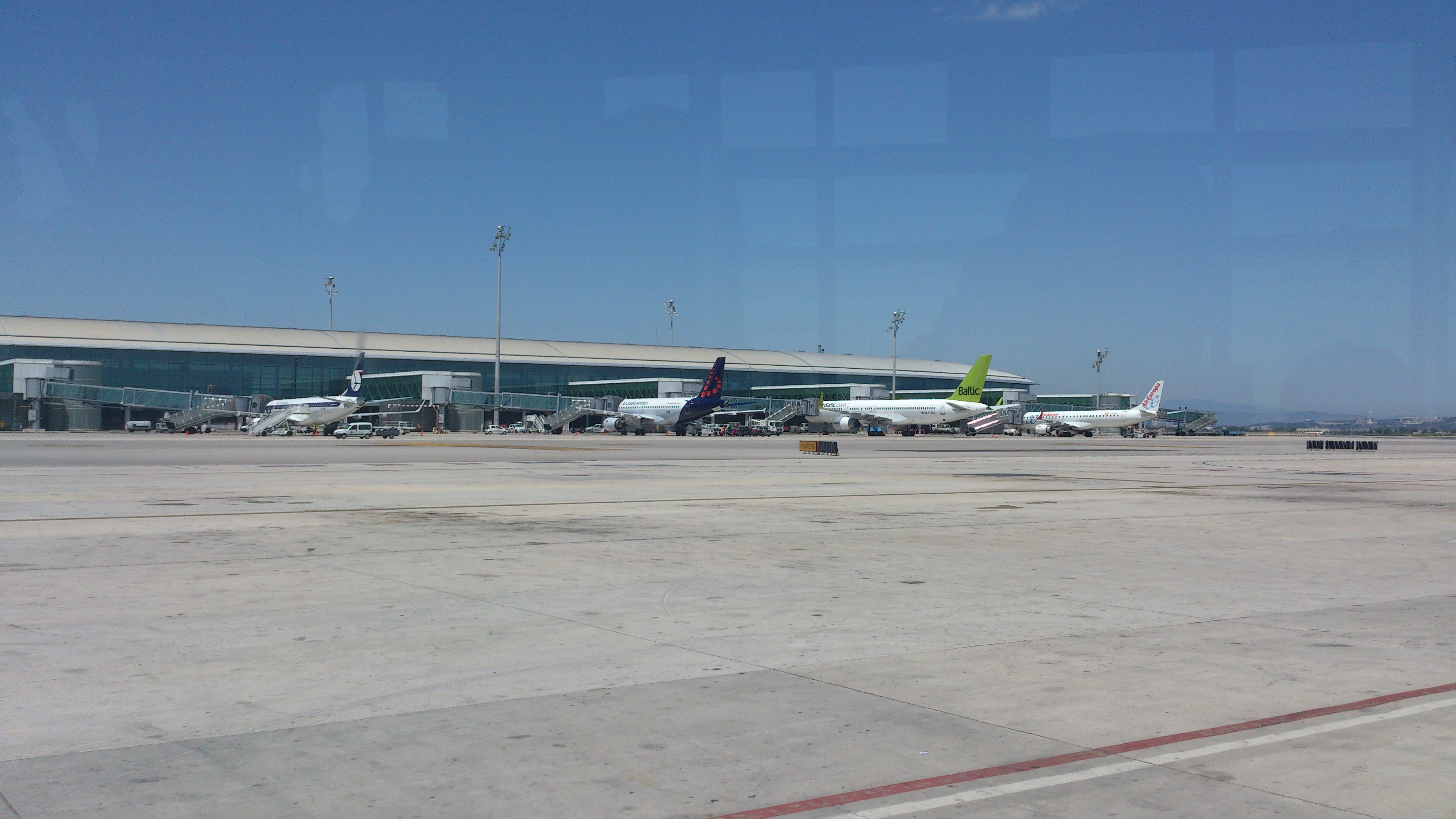 Barcelona Airport